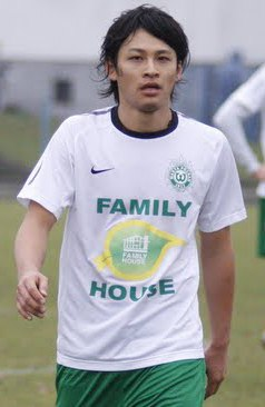 Keisuke Ogawa on trial at Warta Poznań